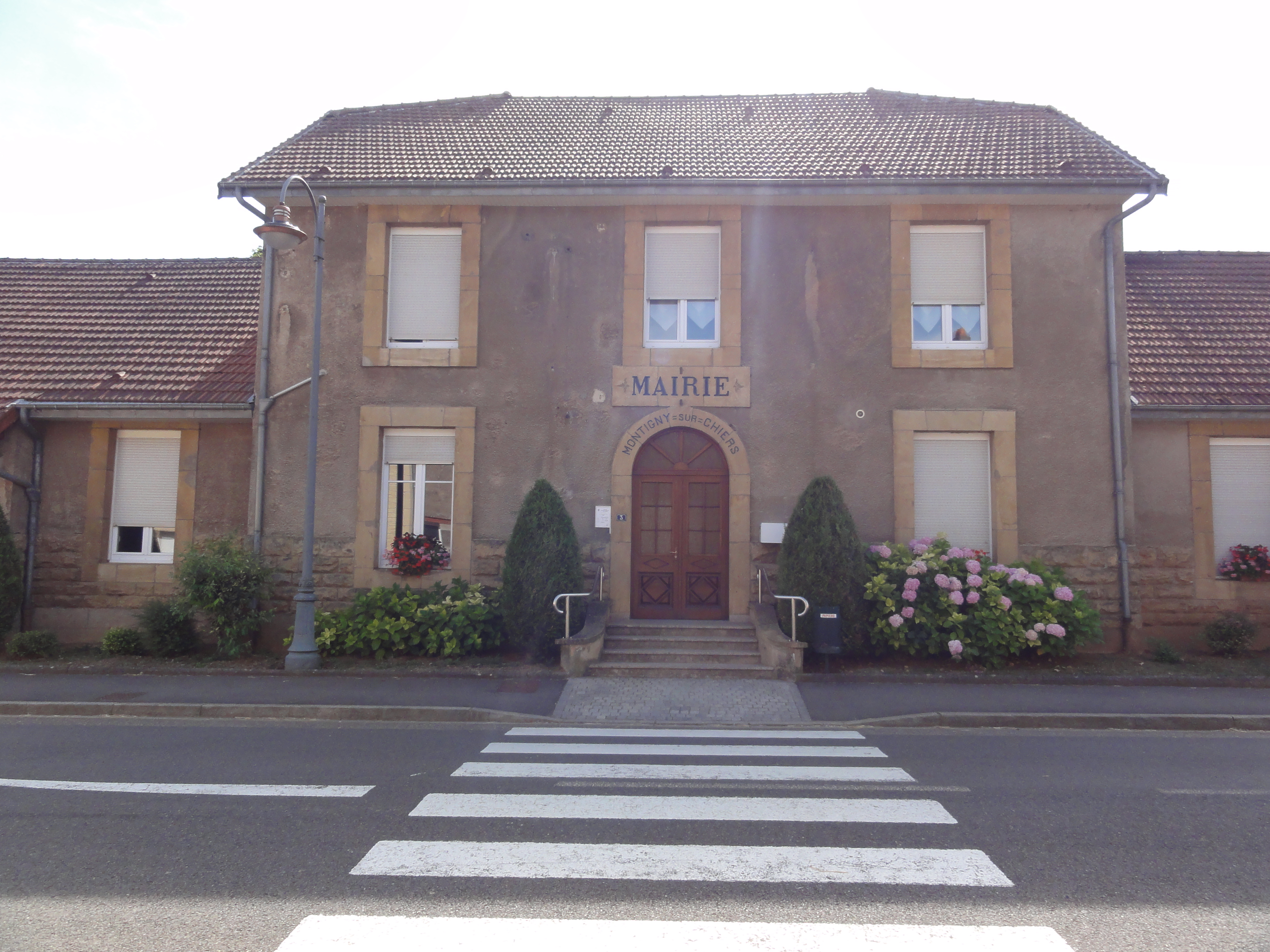 Montigny-sur-Chiers (Meurthe-et-M.) mairie